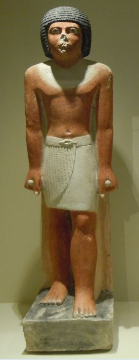 Grabstatue des Memi aus Kalkstein aus dem Roemer und Pelizaeus-Museum Hildesheim